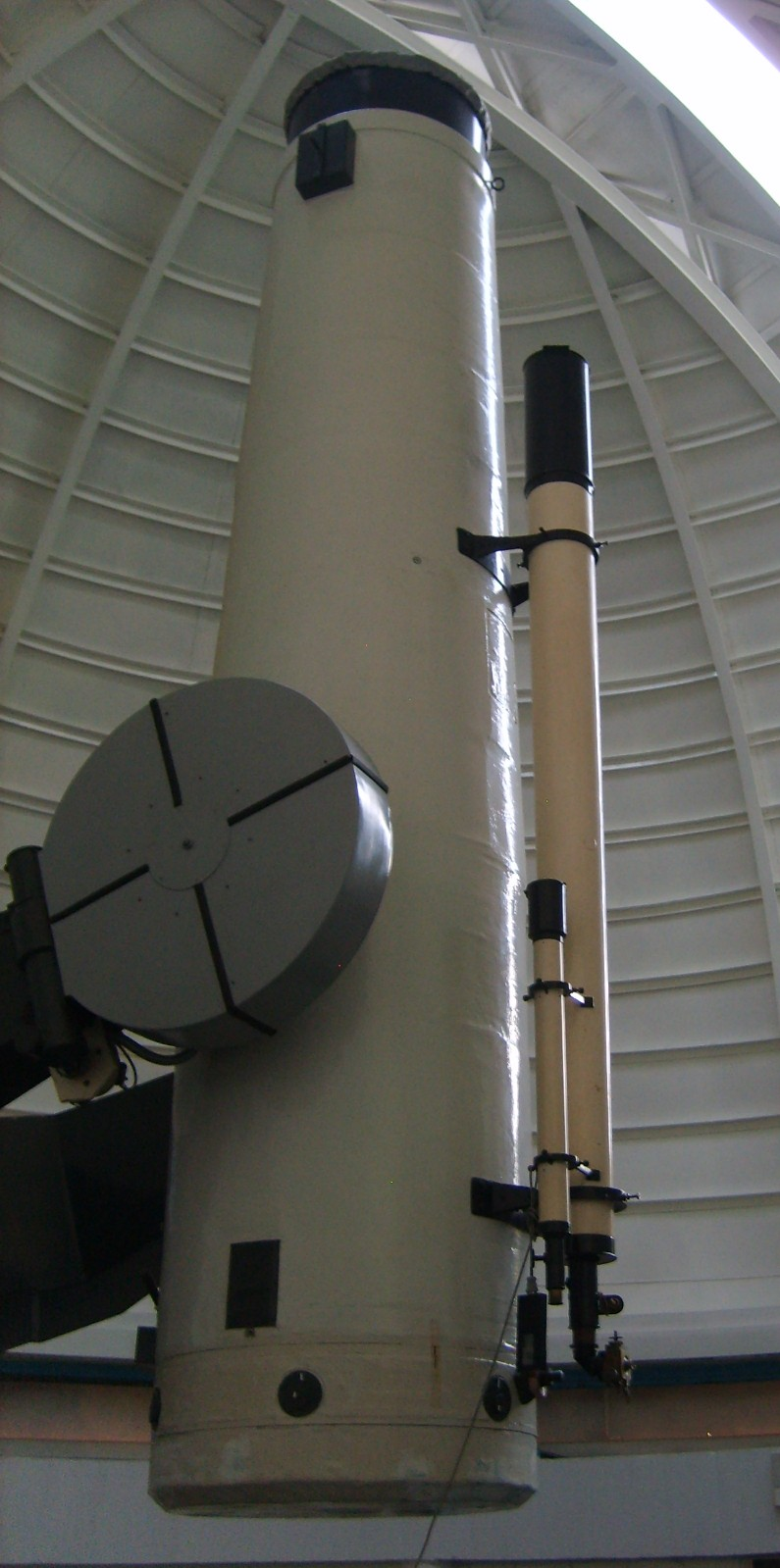 Cámara Scmidt de Tonantzintla.